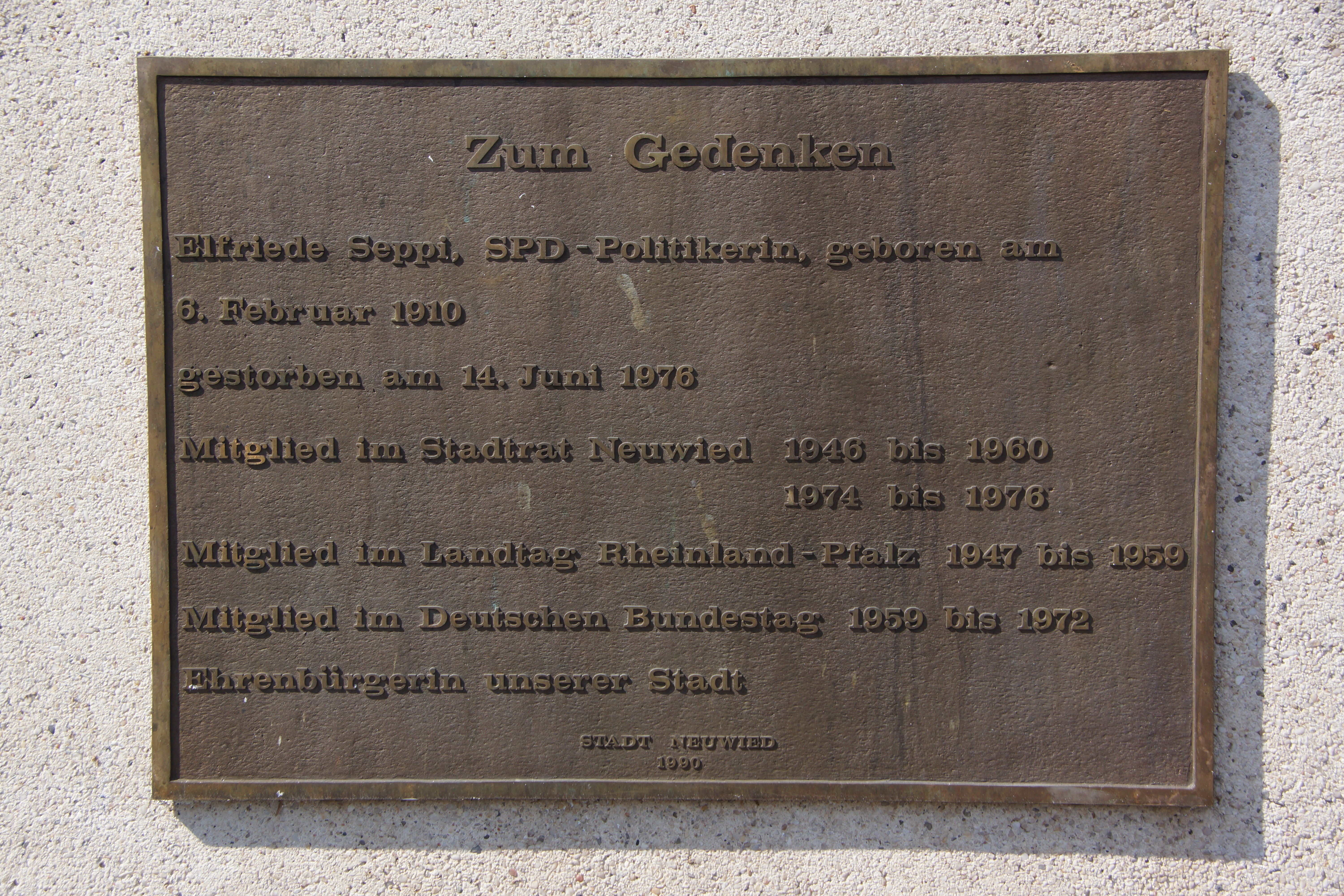 Elfriede Seppi, Gedenktafel in Neuwied